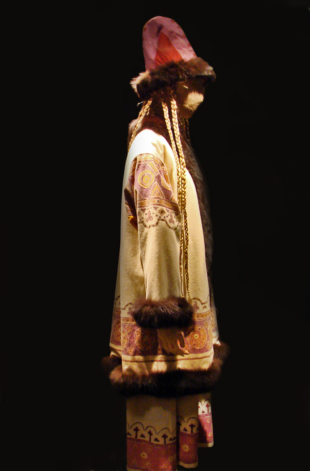 D'après Nicolas Roerich Costume pour un rôle mauve dans le Sacre du printemps ballet de Vaslav Nijinsky Reprise à l'Opéra de Paris, 1991 Exposition Ballets russes Bibliothèque-musée de l'Opéra de Paris